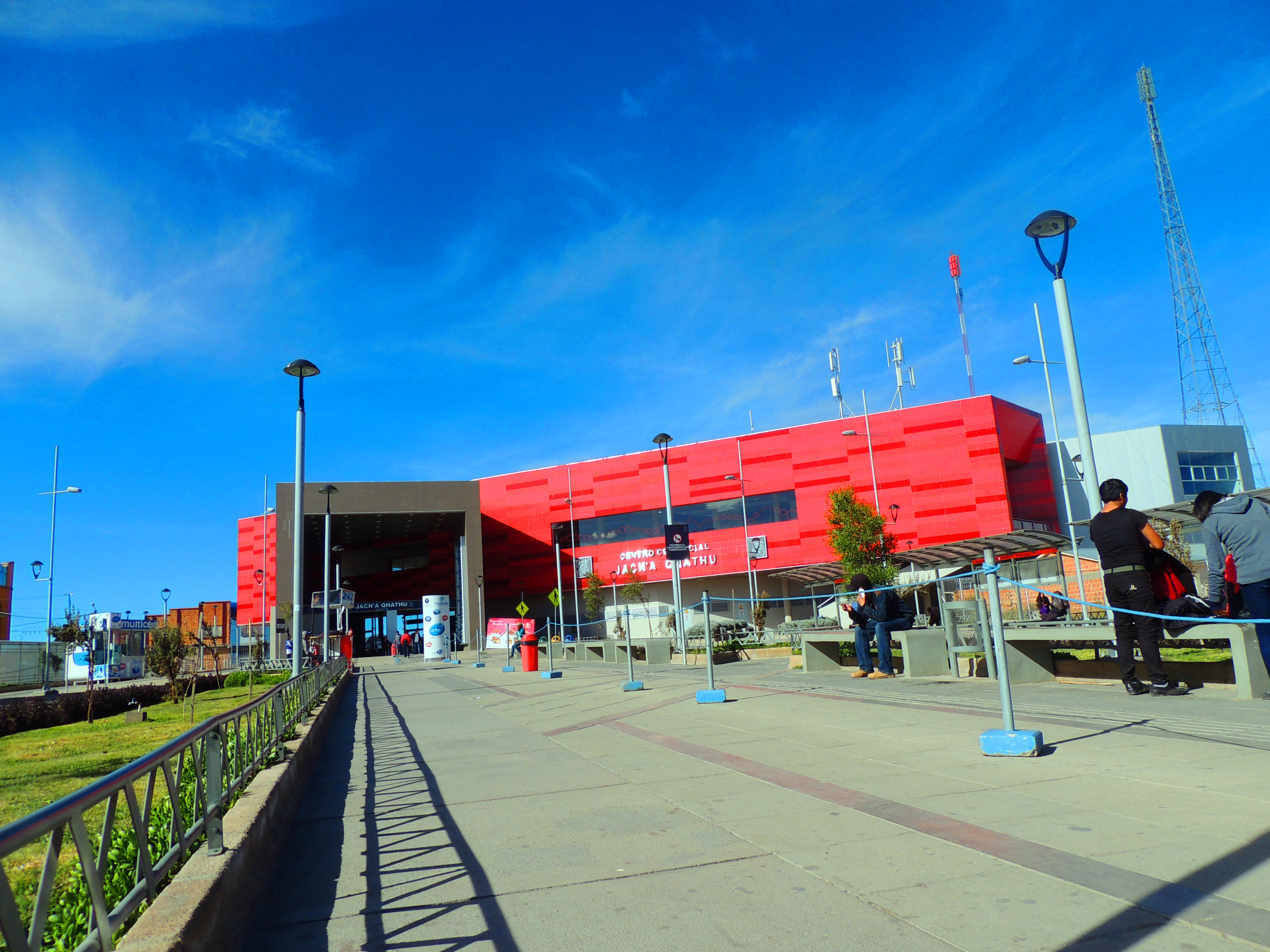 Estación 16 de Julio o Jach’a Qhathu de MI Teleferico El Alto Bolivia